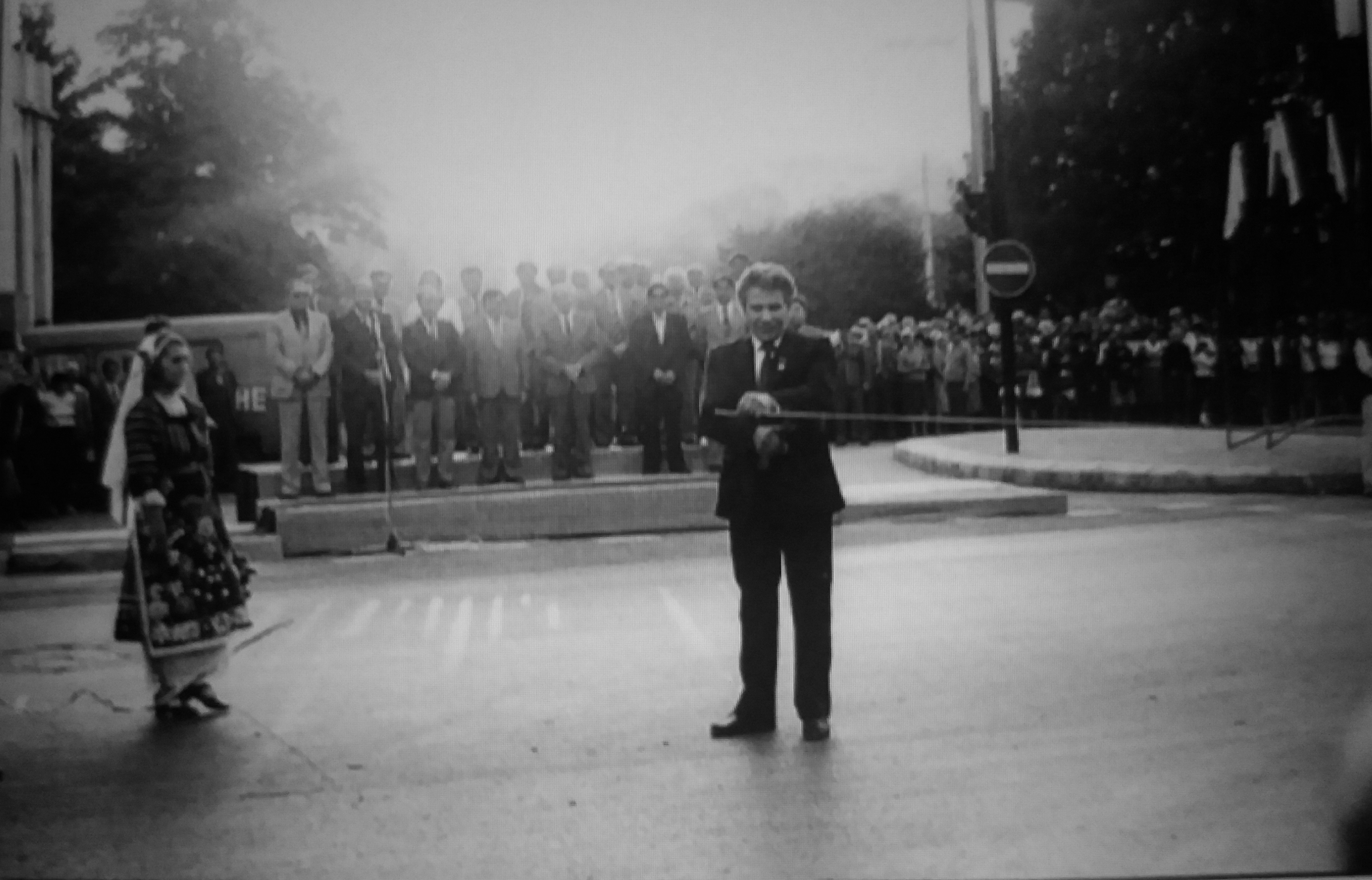 Момент от прерязването на лентата на 07.10.1985 г.